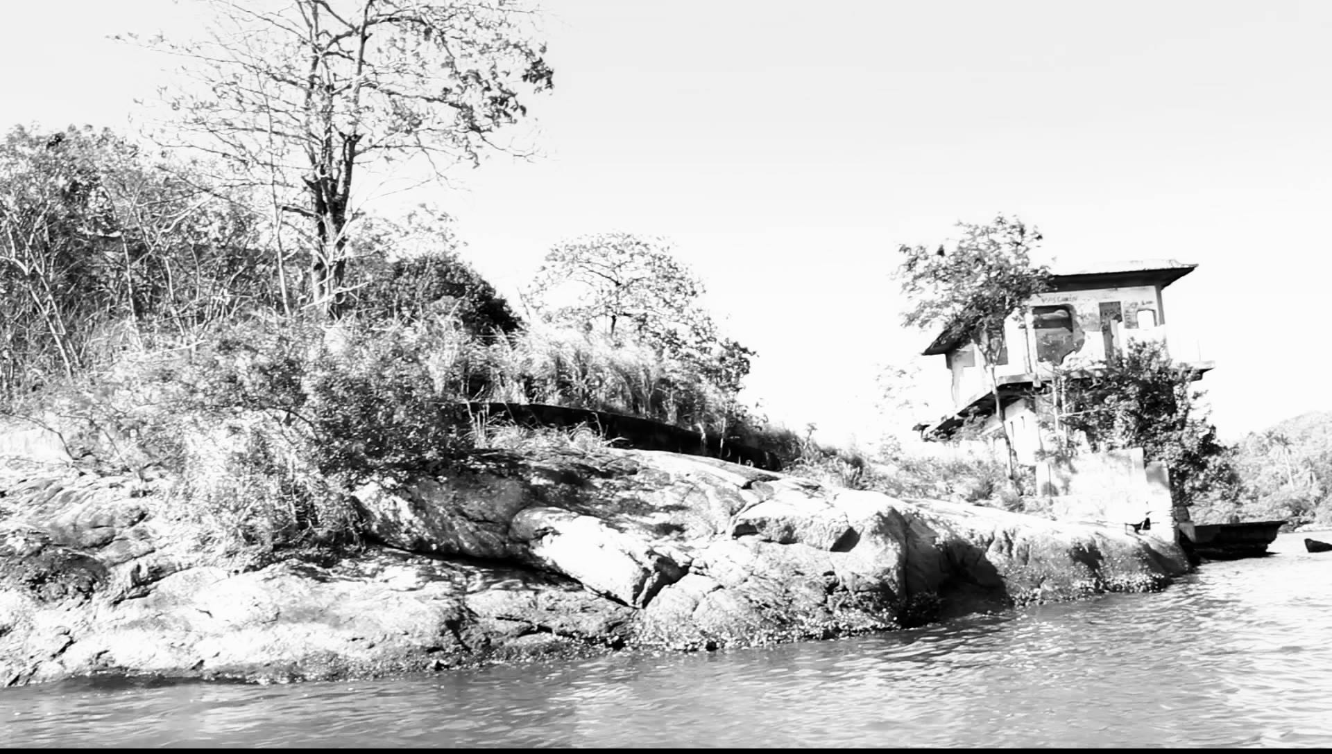 Foto da Ilha da Pólvora